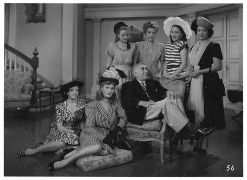 Escena en un interior, al centro con una venda en la frente y sentado de costado en un sillón, Francisco Alvarez, rodeado por un grupo de jovencitas. Sentada y primera desde la izquierda, Gloria Ugarte, de pie y segunda desde la derecha, Dorita Vernet. Detrás una escalera y el mobiliario de una sala de estar.